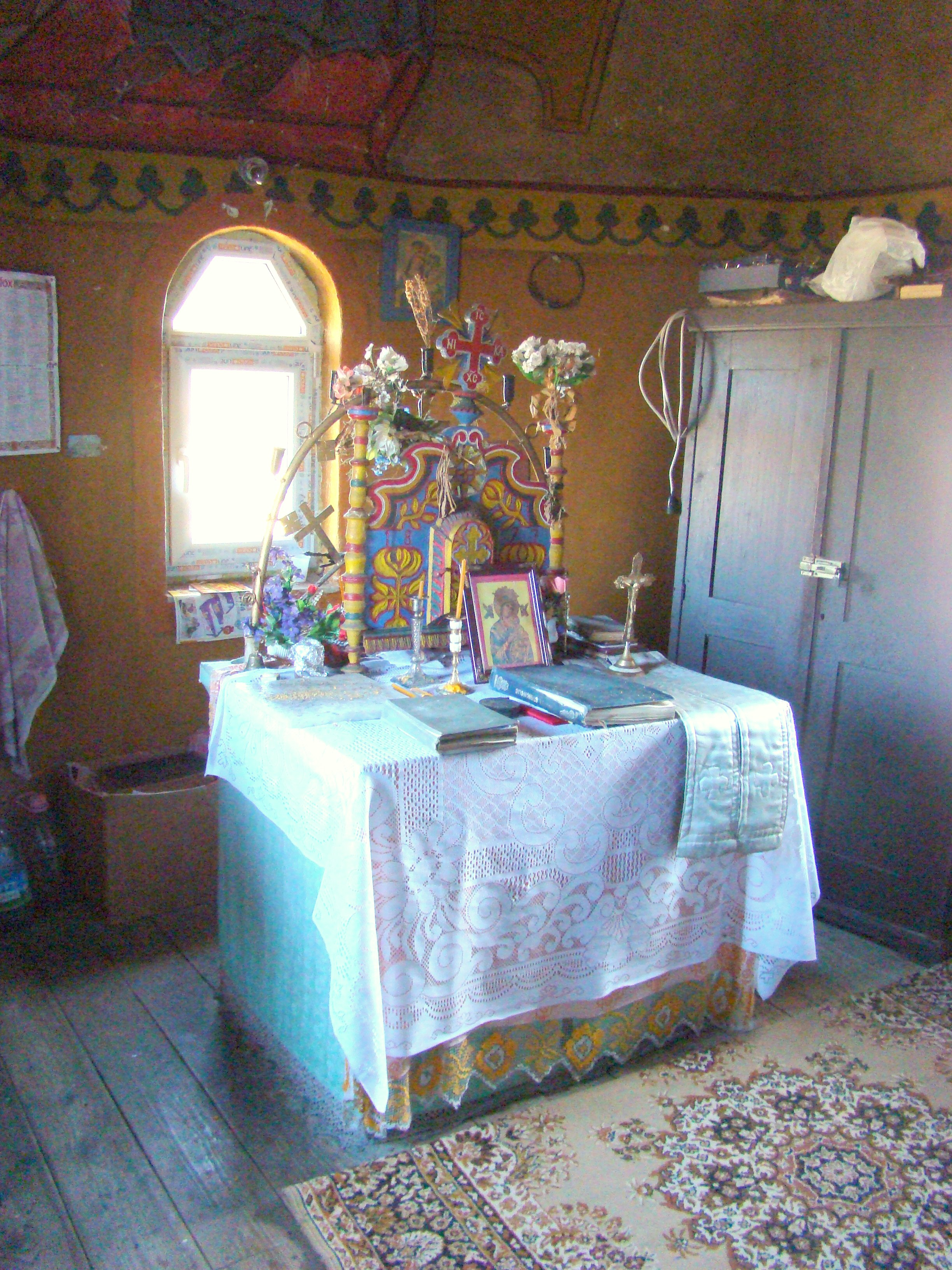 Biserica de lemn „Sființii Arhangheli Mihail şi Gavriil" din Colești, județul Bihor